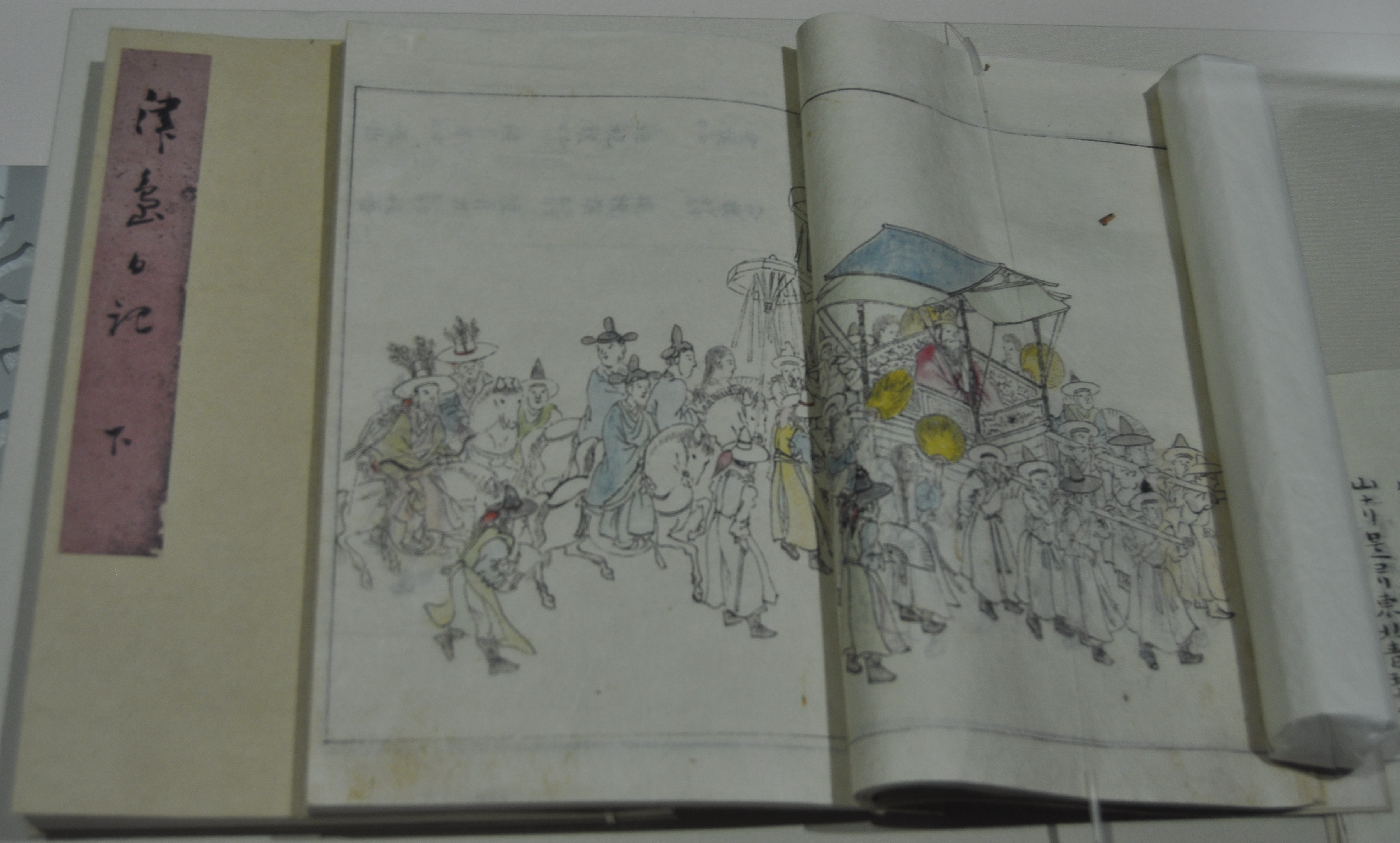 진도일기 1811년 쿠사바하이센(草場珮川) 타쿠시립향토자료관 소장 1811년 5~7월 초까지 조선통신사 일행이 일본에 머문 2개월간의 여정을 기록한 3권의 책이다. 내용 중에 통신사선과 사절단의 모습, 일본 각 지역의 영주와 호위 무사 등이 그림으로 묘사되어 있다. 특히 각종 그림지도, 통신사의 행렬, 쌍방의 국서와 그 봉인법, 통신사의 복식과 소지품, 많은 배들에 예인되어 귀국길에 오르는 통신사선 등 자료 자료에서 볼 수 없는 내용이 많이 포함되어 있다. 2013년 2월 현재, 국립해양박물관(대한민국)에서 전시중이다.